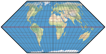 eckert 2